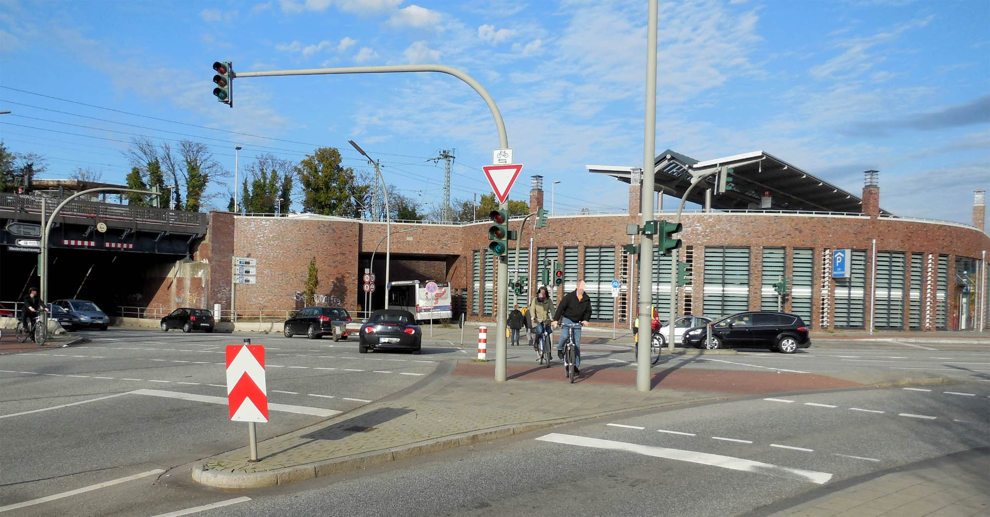 Bahnhof Bergedorf, Parkhaus und Abschluss West mit Busauffahrrampe